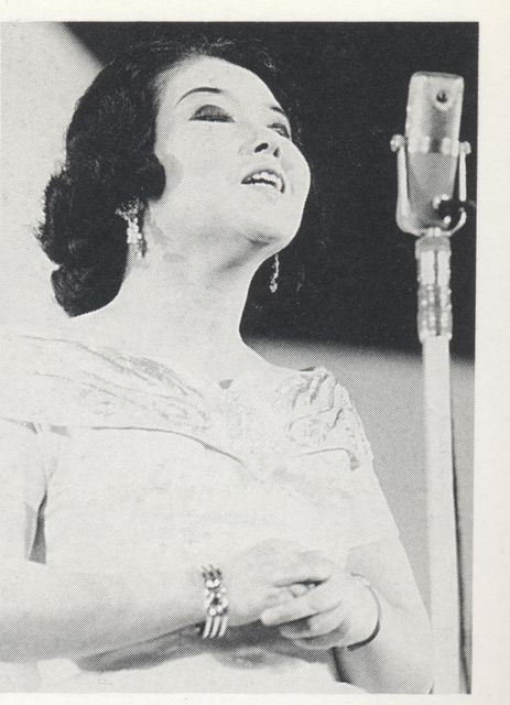 1950年代に発売されたブロマイドをスキャン